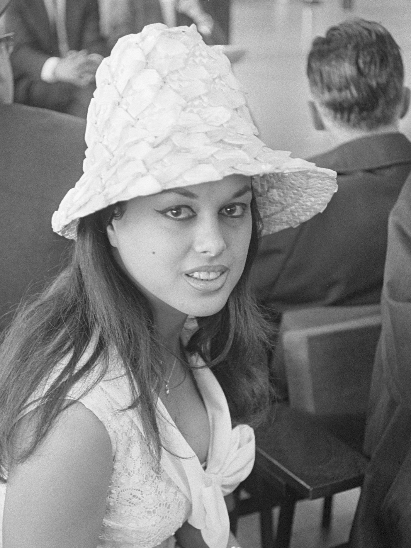 Aliza Gur, Miss Israël 1960, op Schiphol 7 juli 1964